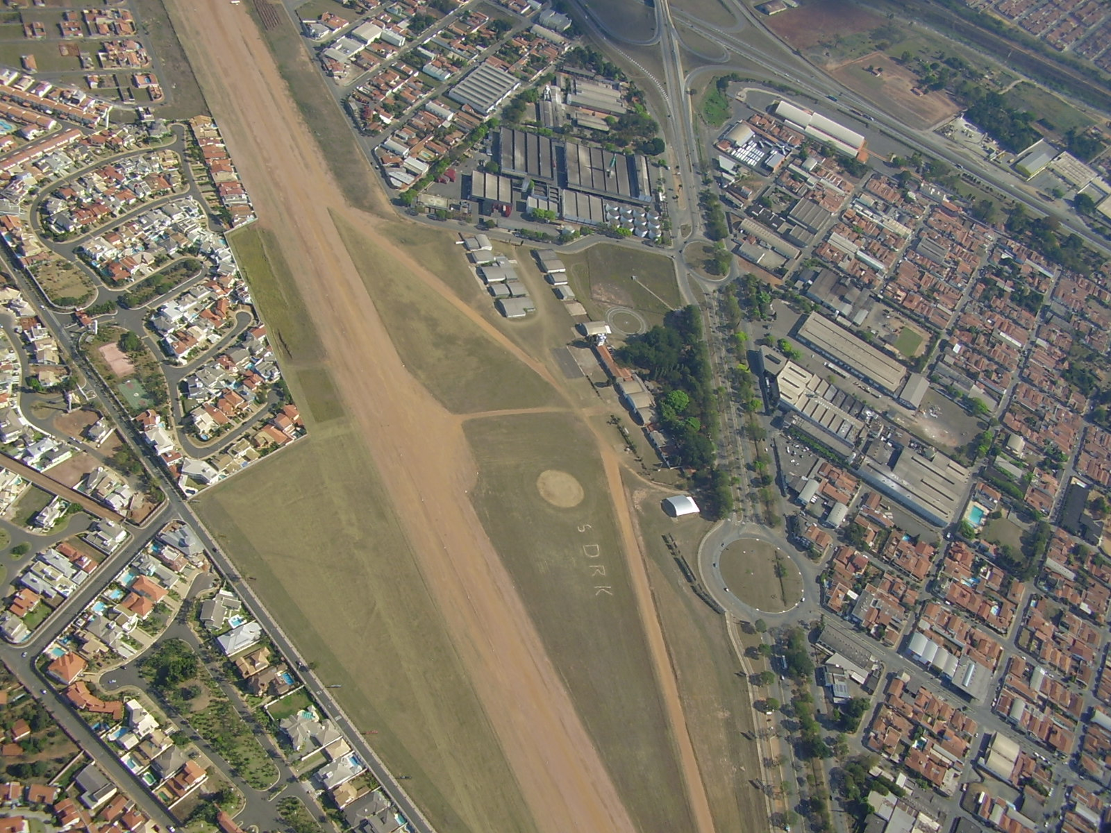 Foto Aérea do Aeroclube de Rio Claro